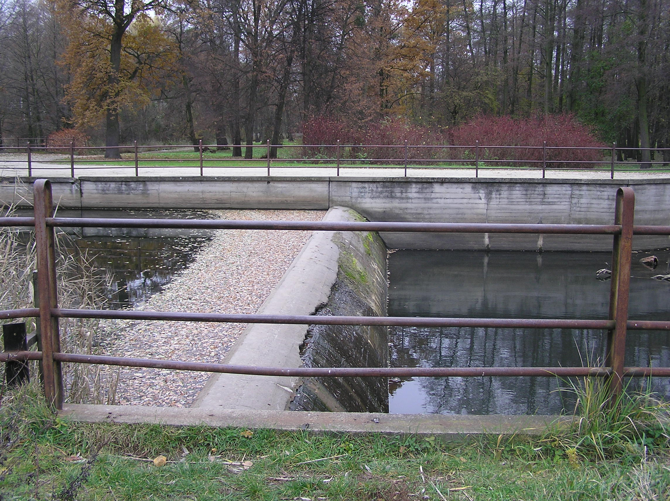 Wrocław, Park Wschodni, jaz stały kierujący przepływem do Dolnej Oławy